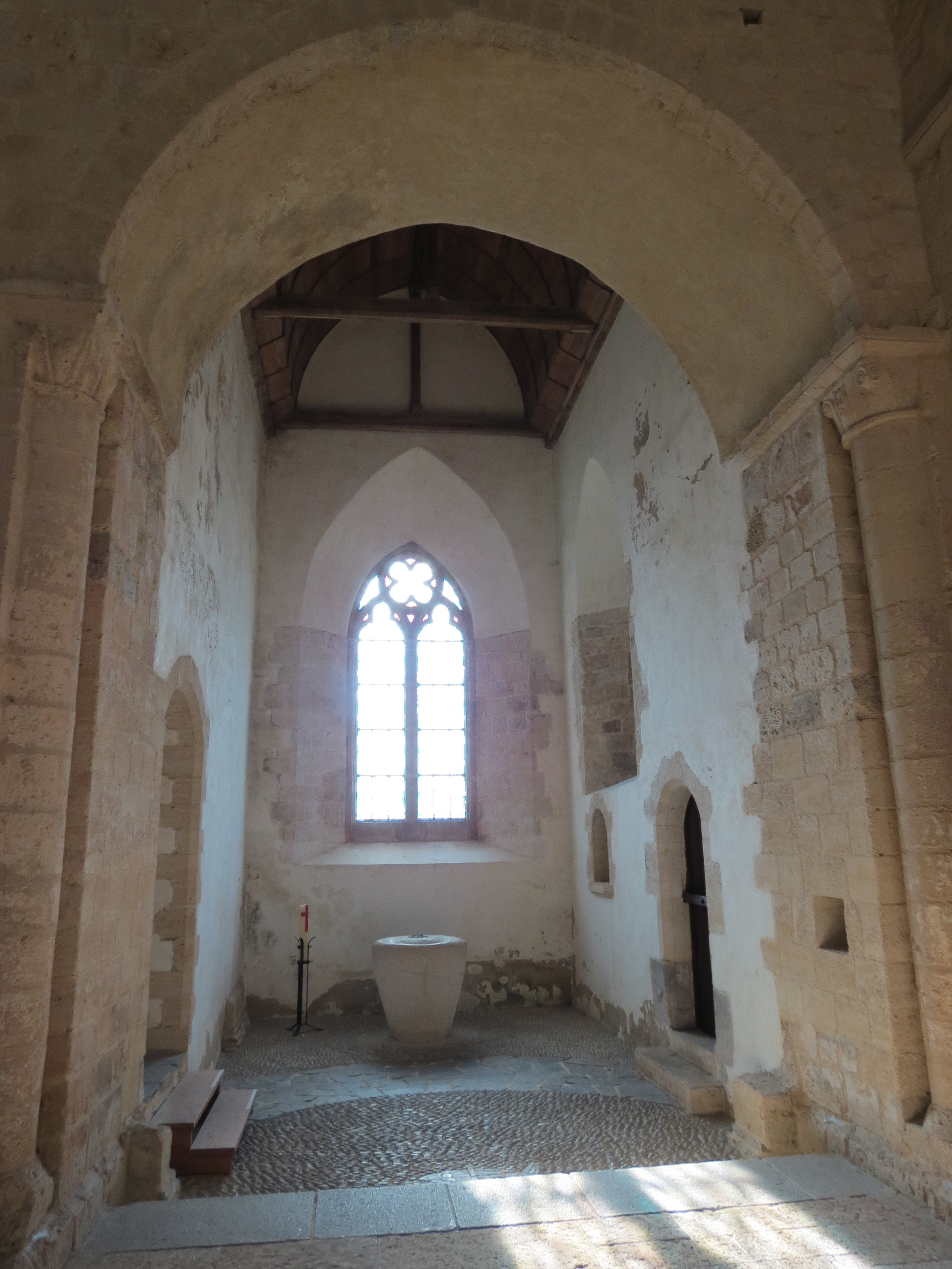 Abbaye de Lessay - chapelle du Sacré-Coeur ou Saint-Pierre, baptistère